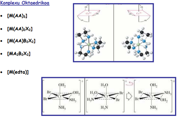 Konplexu oktaedrikoa